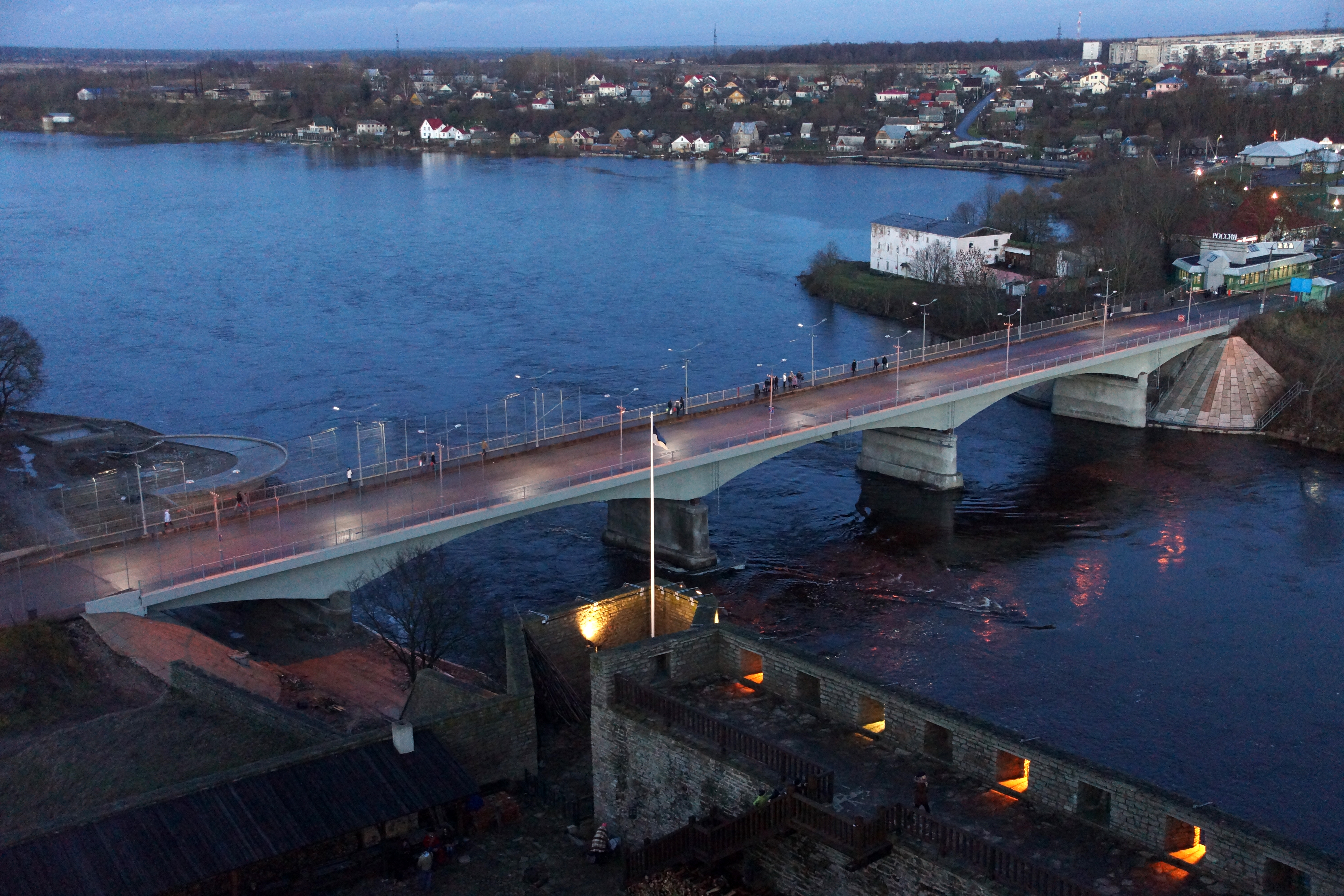 Bron mellan Estland och Ryssland.